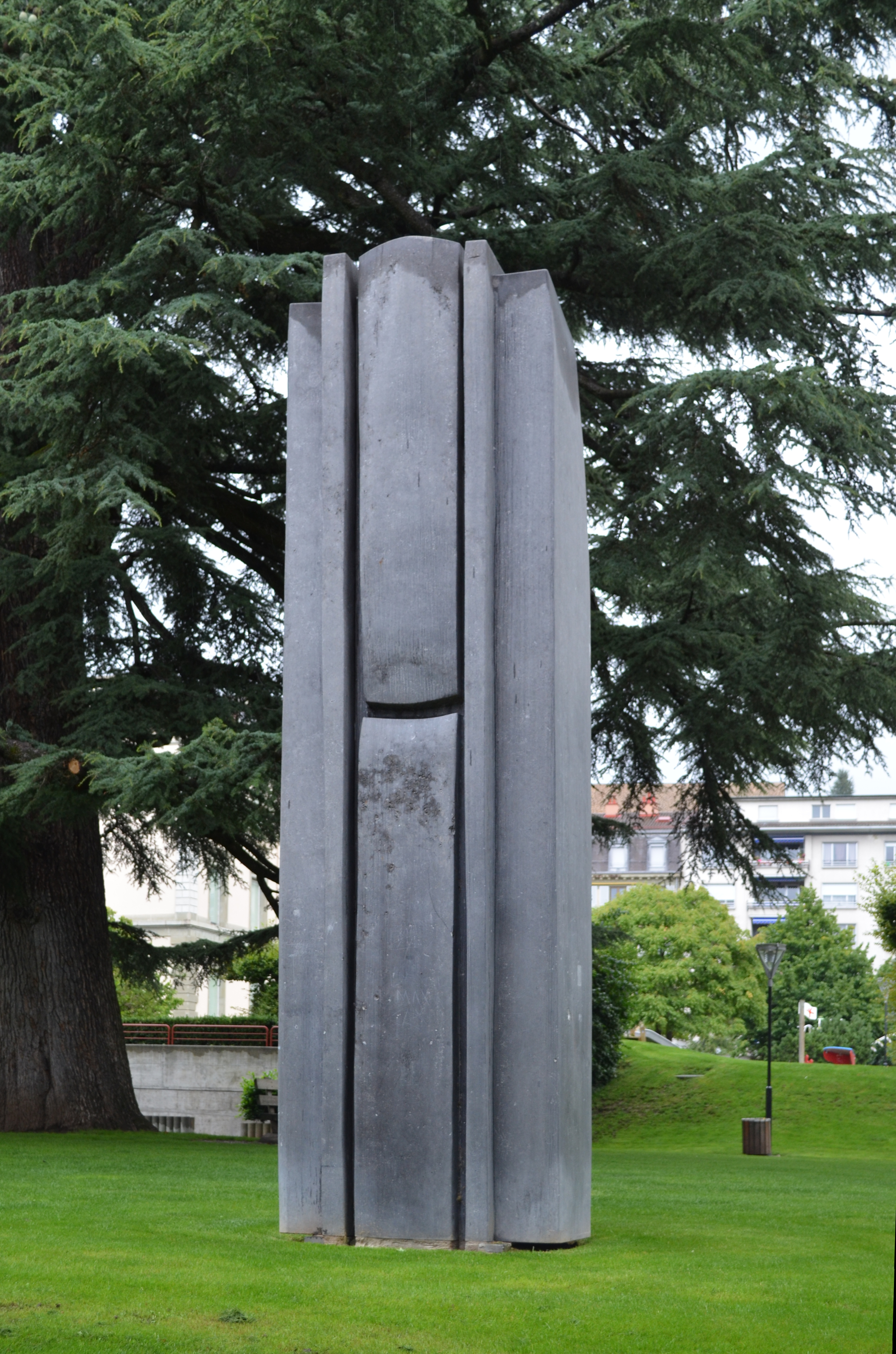 Vevey (Suisse) - Stèle en hommage à Raoul Ubac.